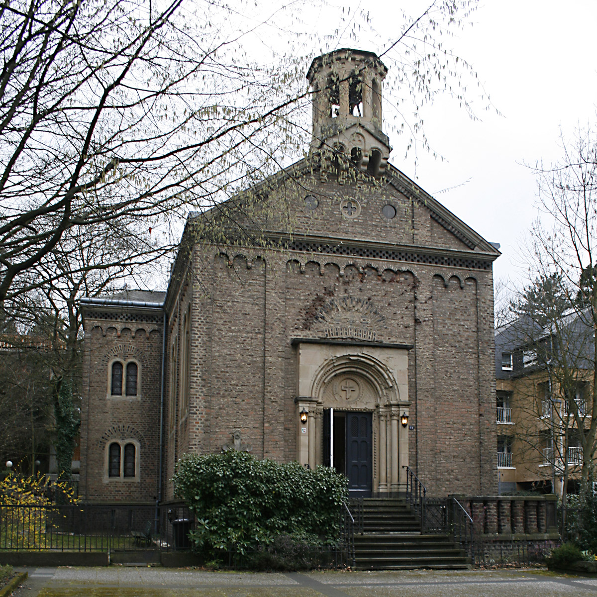 Rigalsche Kapelle in Bonn-Bad Godesberg